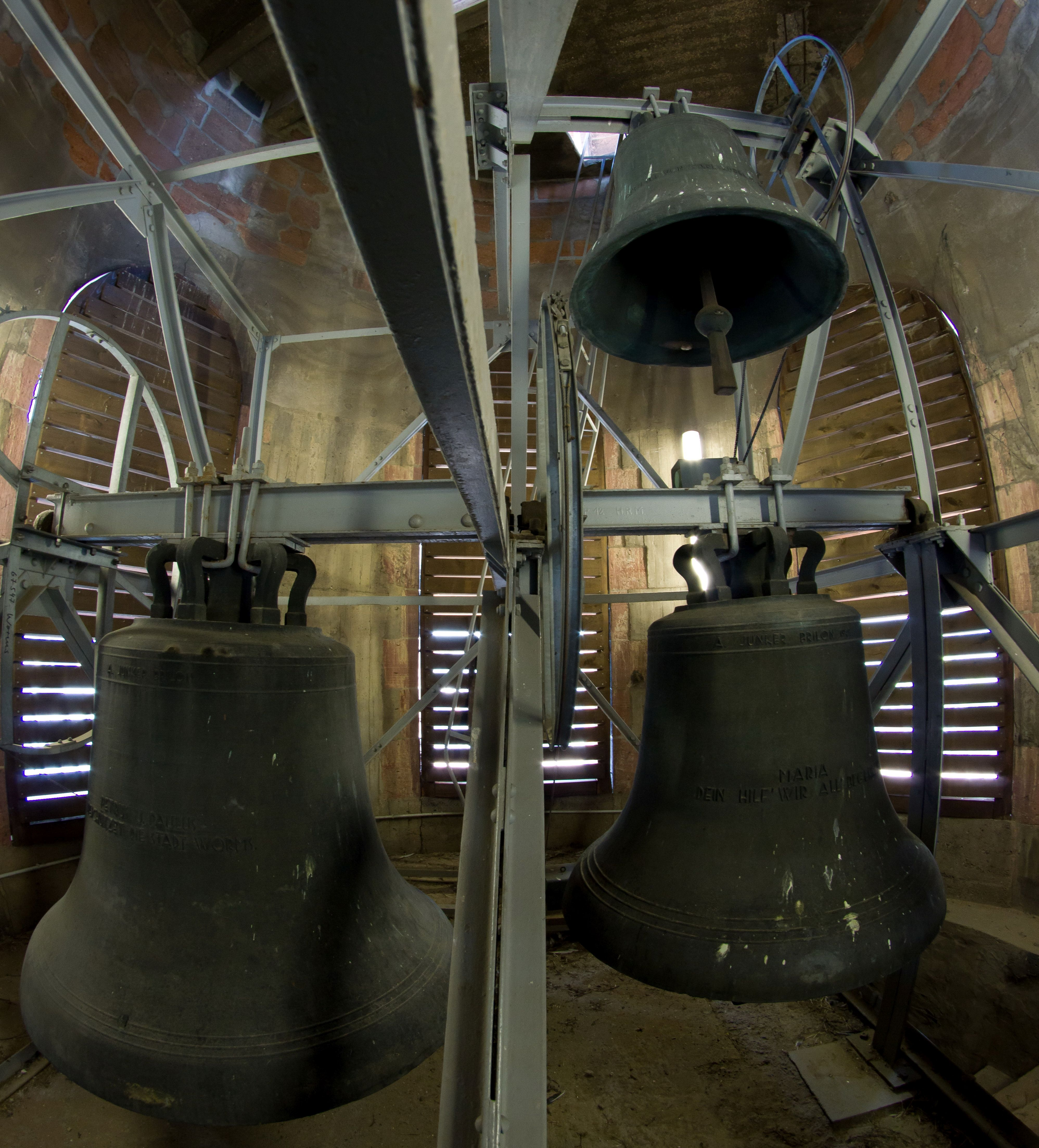 links unten: 1 Petrus und Paulus, 2218 kg rechts unten: 2 Maria, 1114 kg rechts oben. 3 Bruder Konrad, 653 kg